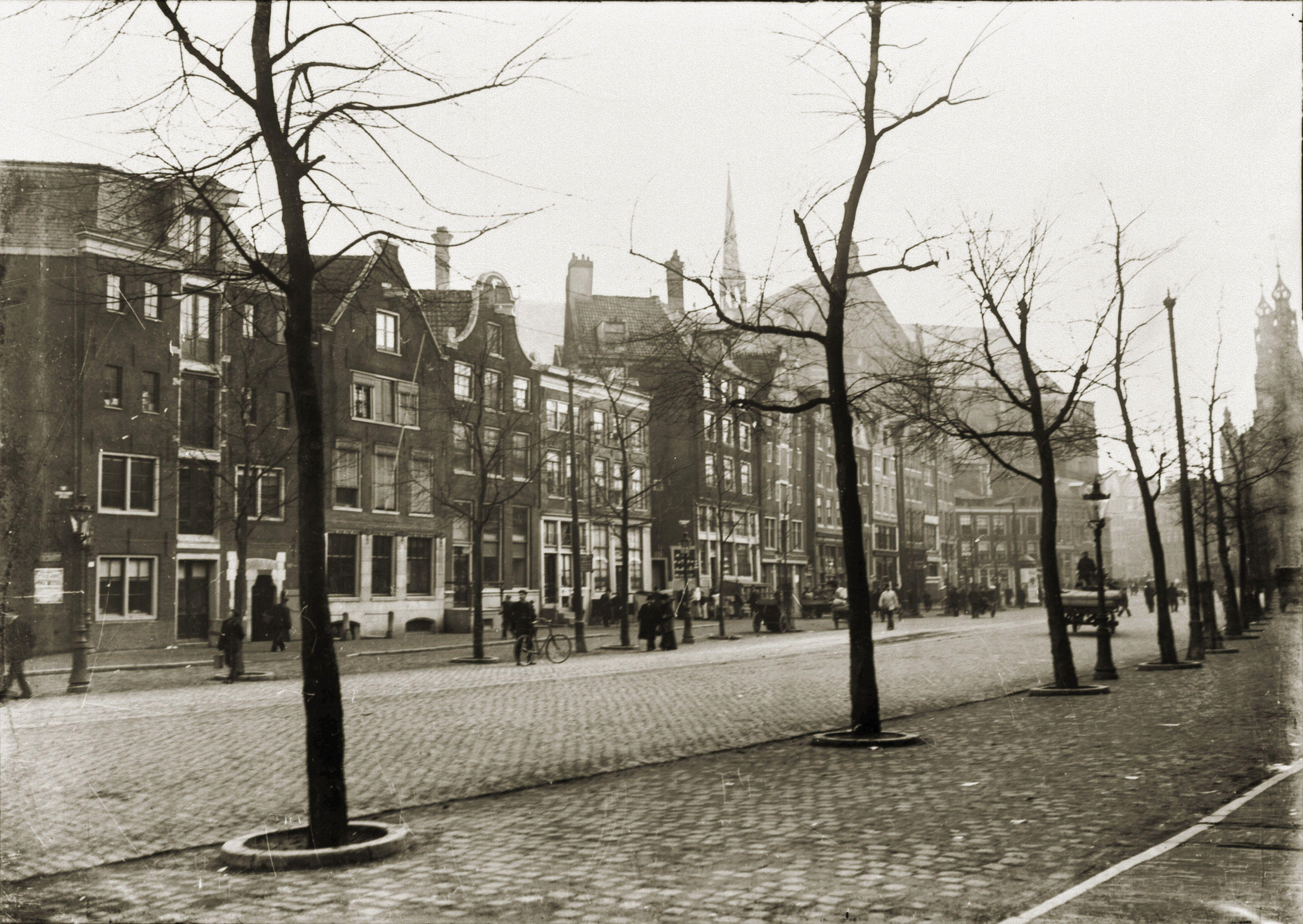 Nieuwezijds Voorburgwal 87-143 (v.l.n.r.). Foto. Afmetingen onbekend. Amsterdam, Stadsarchief Amsterdam, Fotoarchief G.H. Breitner.